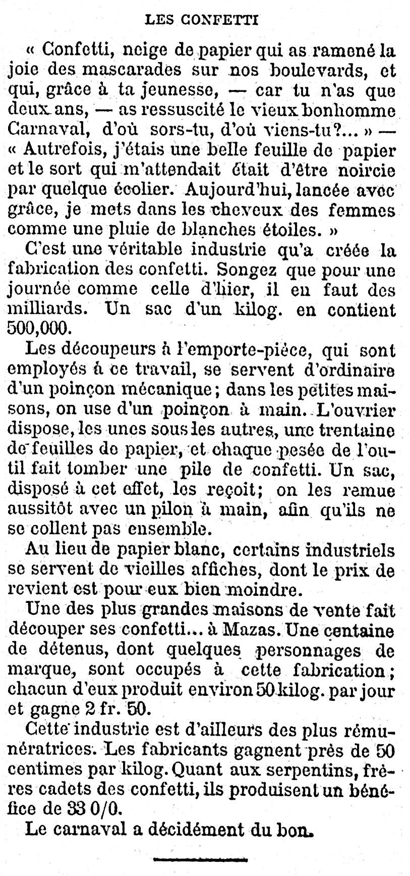 Article sur les confettis, leur usage et fabrication.